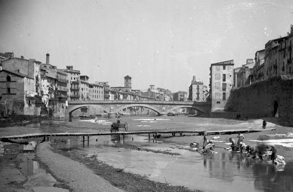 Imatge